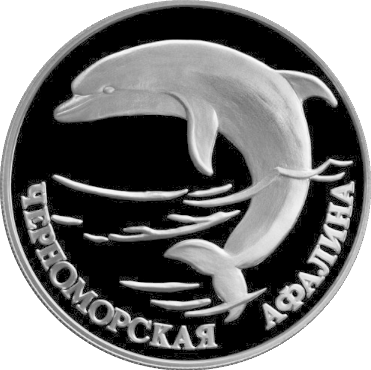 Серия: «Красная книга», Черноморская афалина, 1 рубль, реверс.